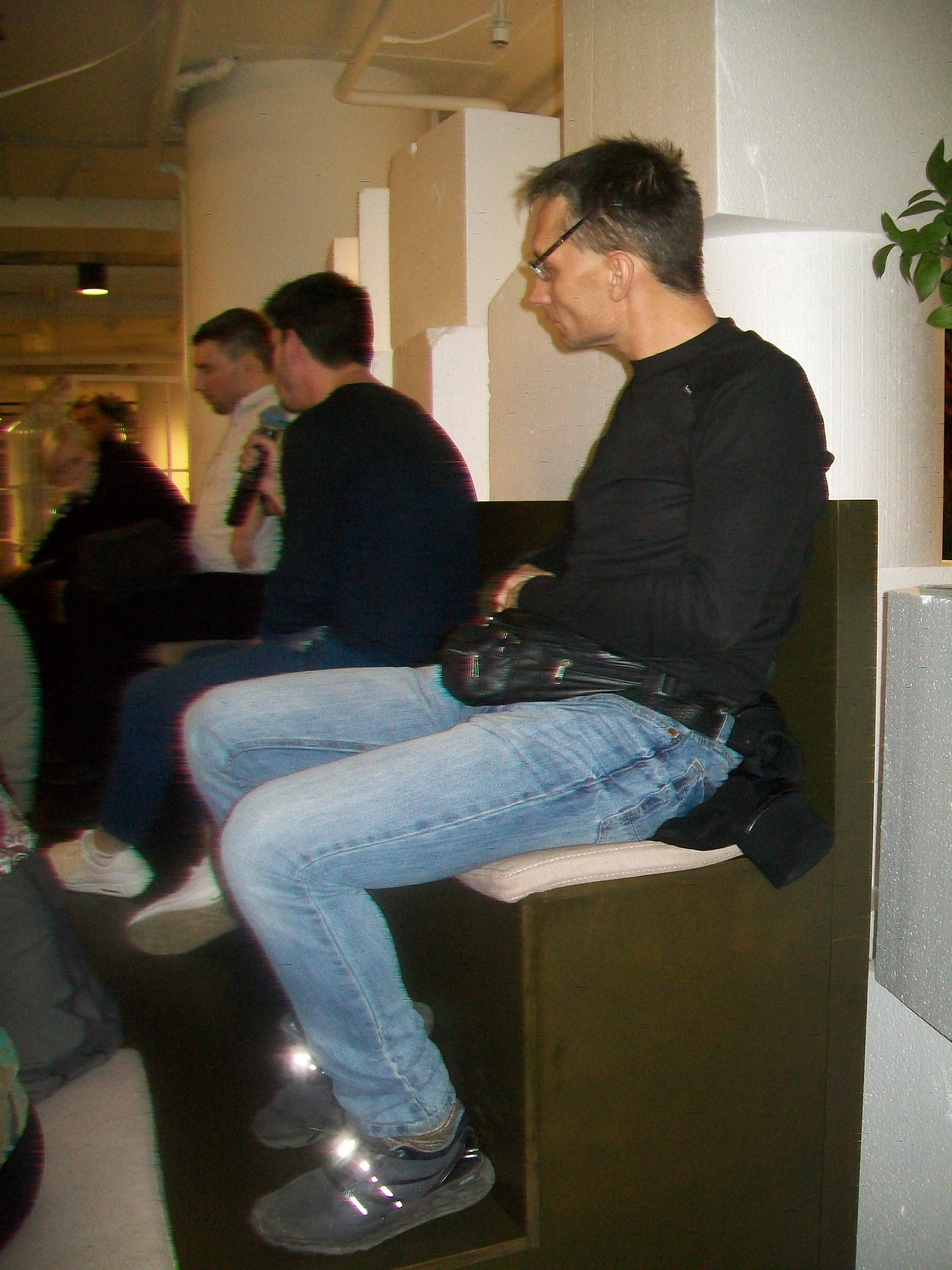 Андрей Гусельников. Журналист в Ельцин-центре. 16 октября 2018 года